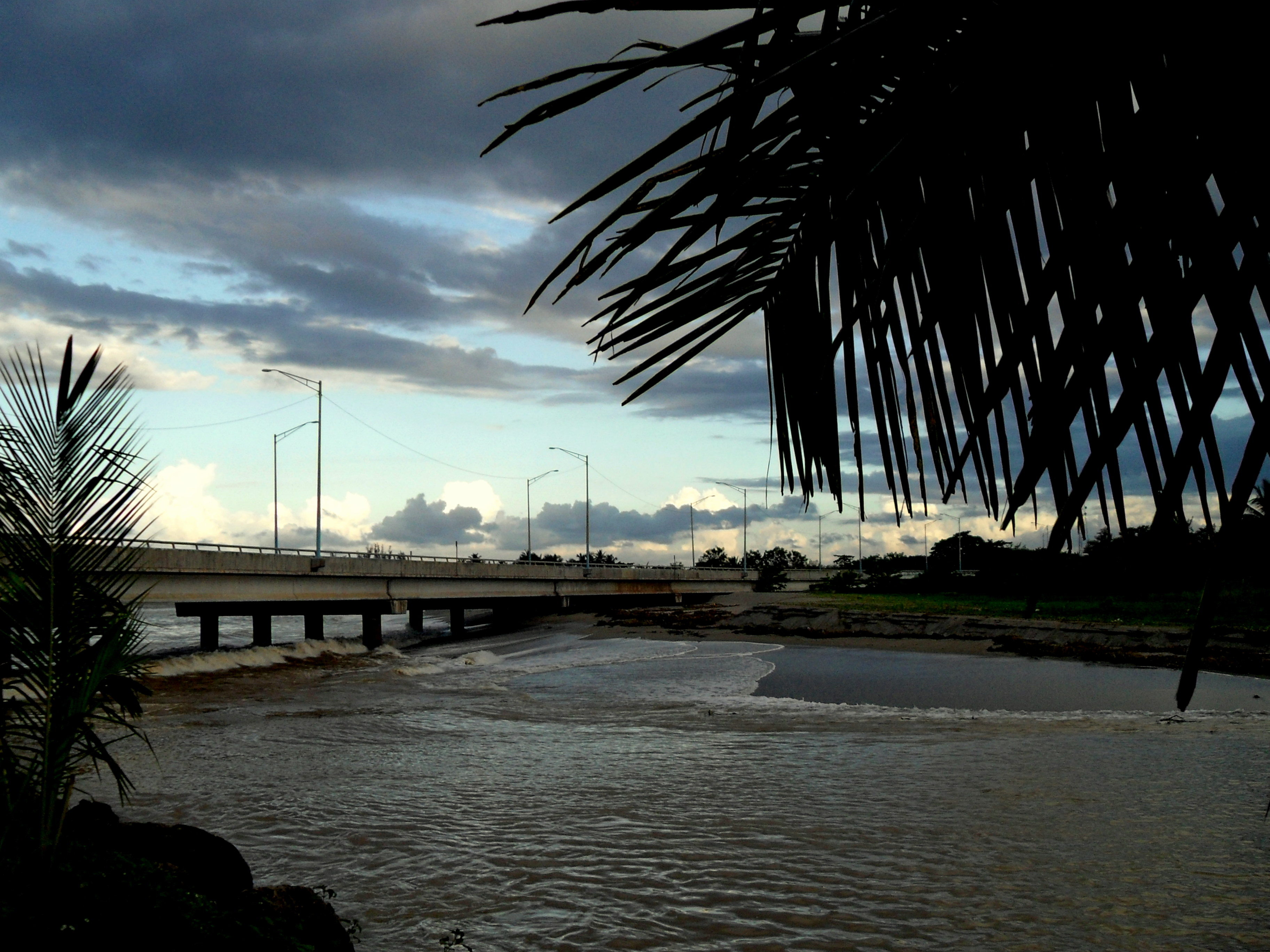 Puente Victor Rojas, Arecibo, Puerto Rico